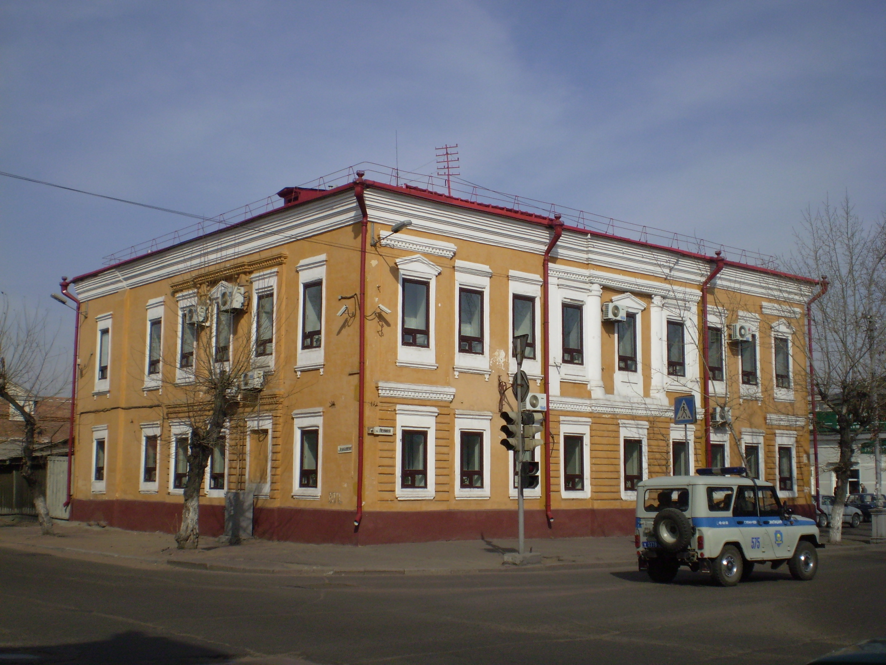 Здание бывшей полицейской управы Верхнеудинска